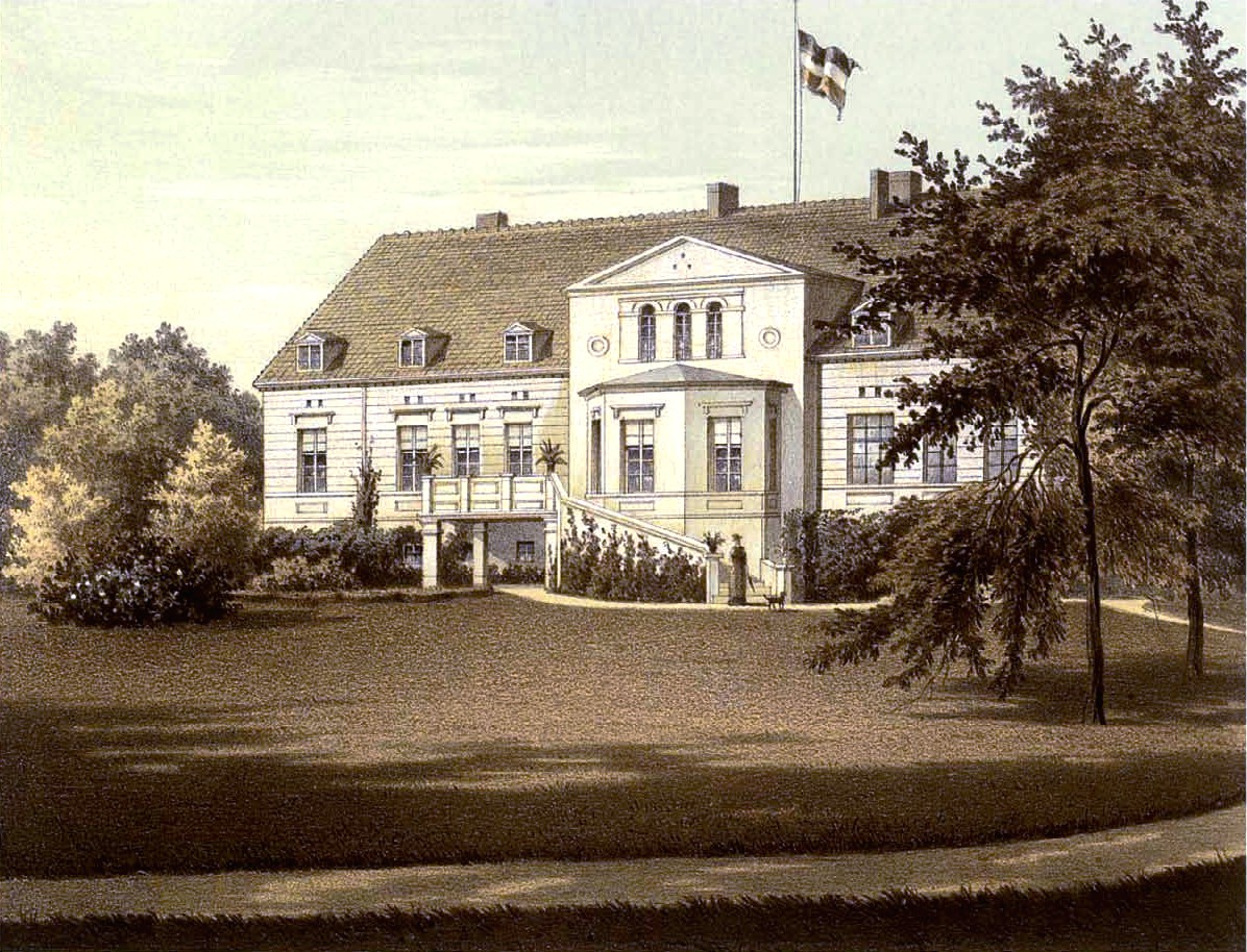 Rittergut Schönwerder B, Kreis Pyritz, Provinz Pommern